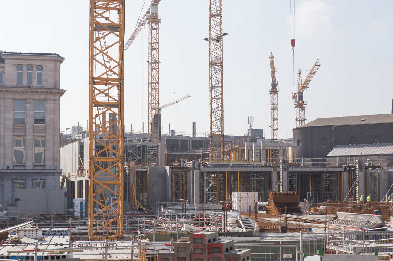 Avancement des travaux de Rive Gauche à la place de l'ancien Bon Marché et de la place Albert Ier.